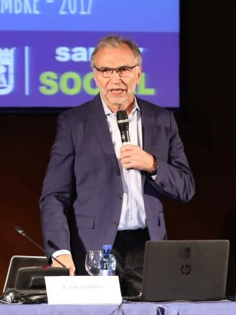 La alcaldesa de Madrid, Manuela Carmena, ha inaugurado hoy, lunes 25 de septiembre, esta jornada internacional sobre un modelo de intervención por el que el Ayuntamiento de Madrid apuesta para trabajar con las personas sin hogar cronificadas en situación de calle. La ponencia marco ha estado a cargo del psicólogo clínico Sam Tsemberis, creador del modelo Housing First en Estados Unidos. En 1992 crea la fundación Pathways to Housing partiendo de la idea de que la vivienda es un derecho, facilitándola a las personas más vulnerables que se encuentran en la calle. Tsemberis asesora a gobiernos de todo el mundo sobre cómo aplicar este programa.